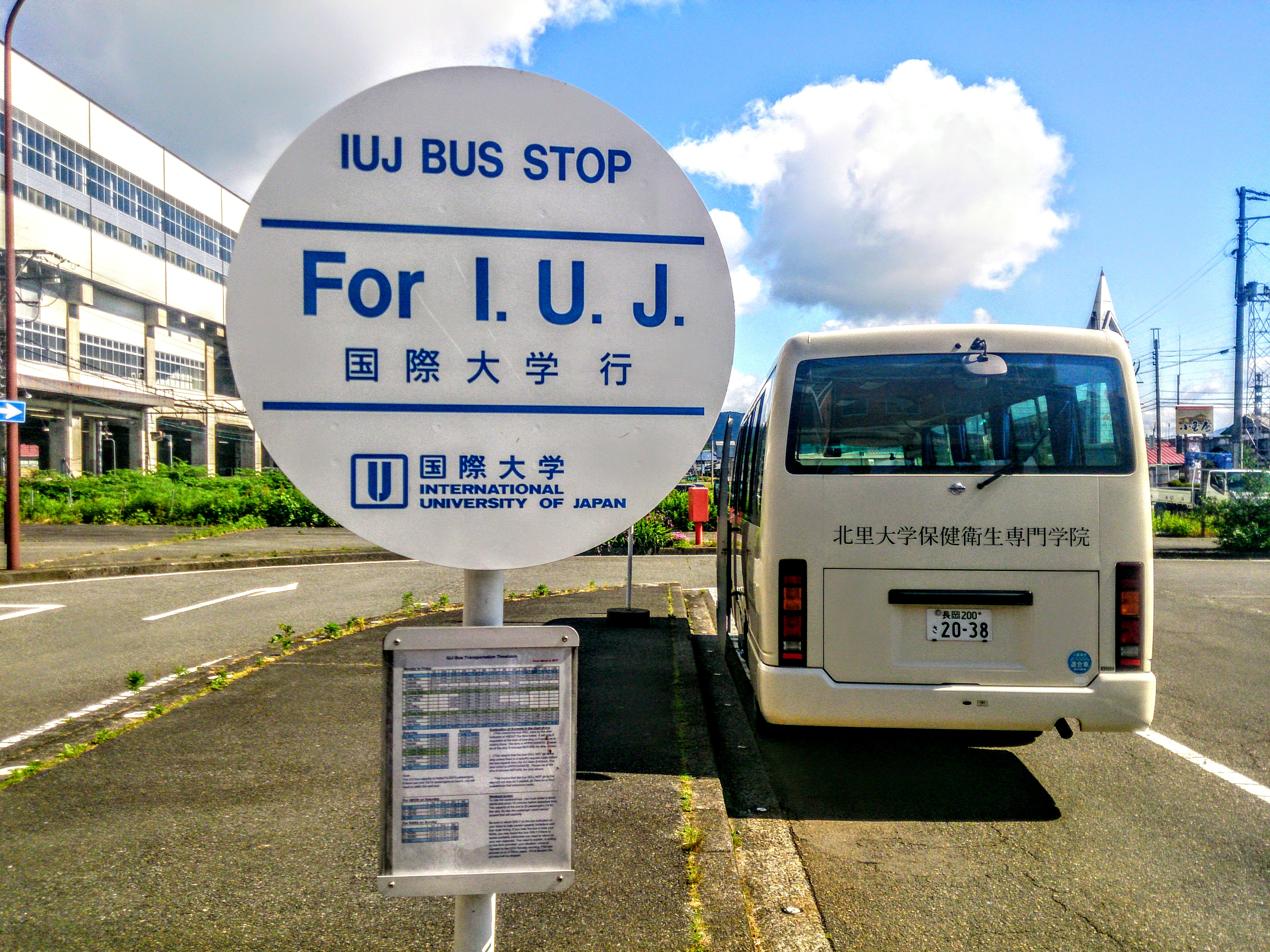 国際大学のスクールバスのりば